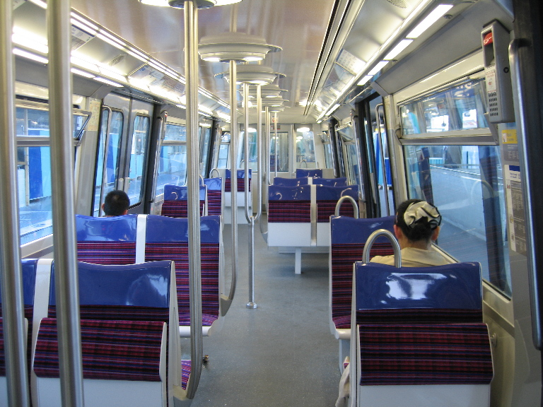 Intérieur d'un MF 77 rénové de la ligne 13 du métro de Paris.